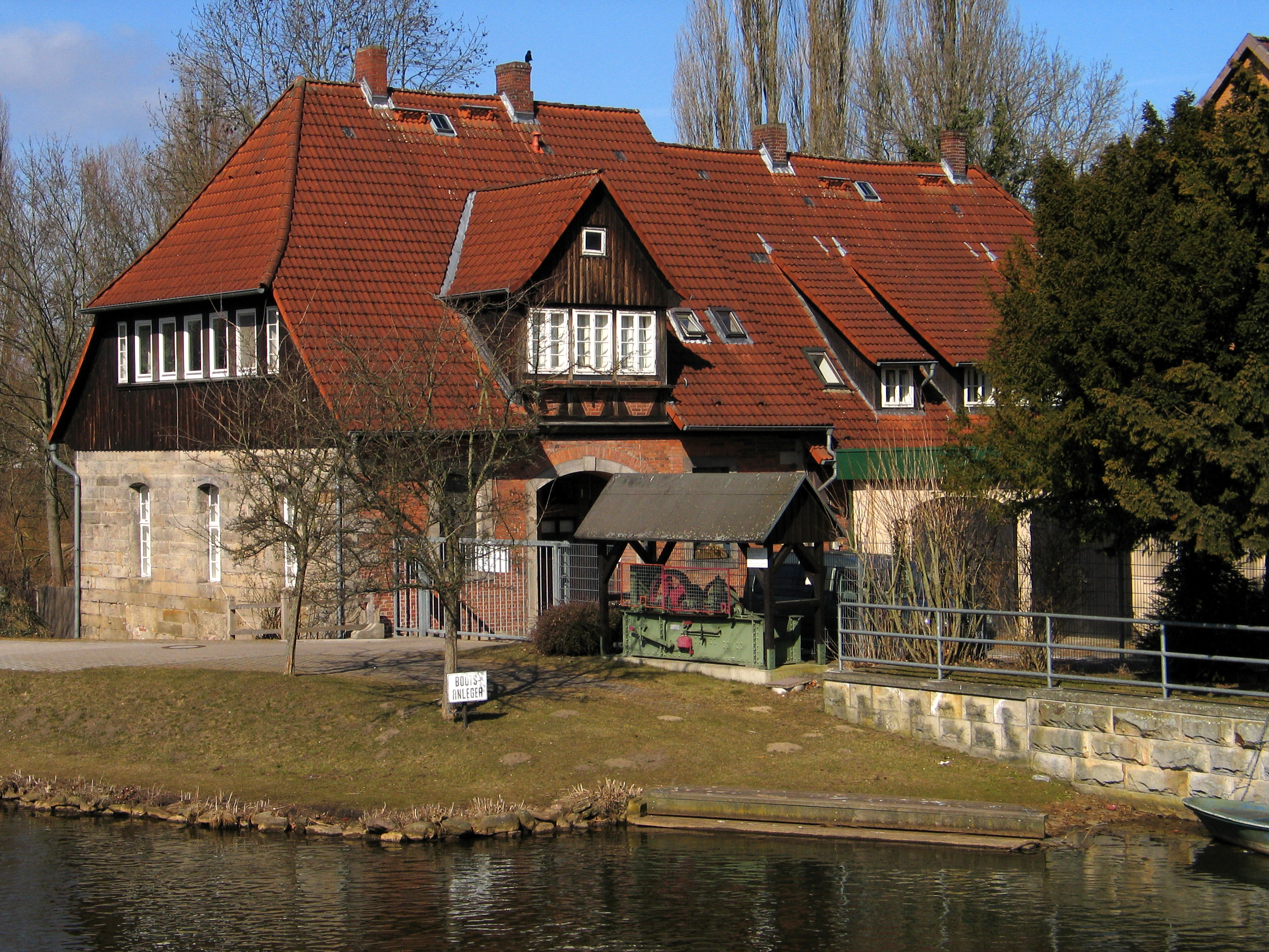 Blick auf die denkmalgeschützte Herrenmühle an der Aller in Celle, gesehen von der im Volksmund genannten B3 Allerbrücke am Torplatz ...